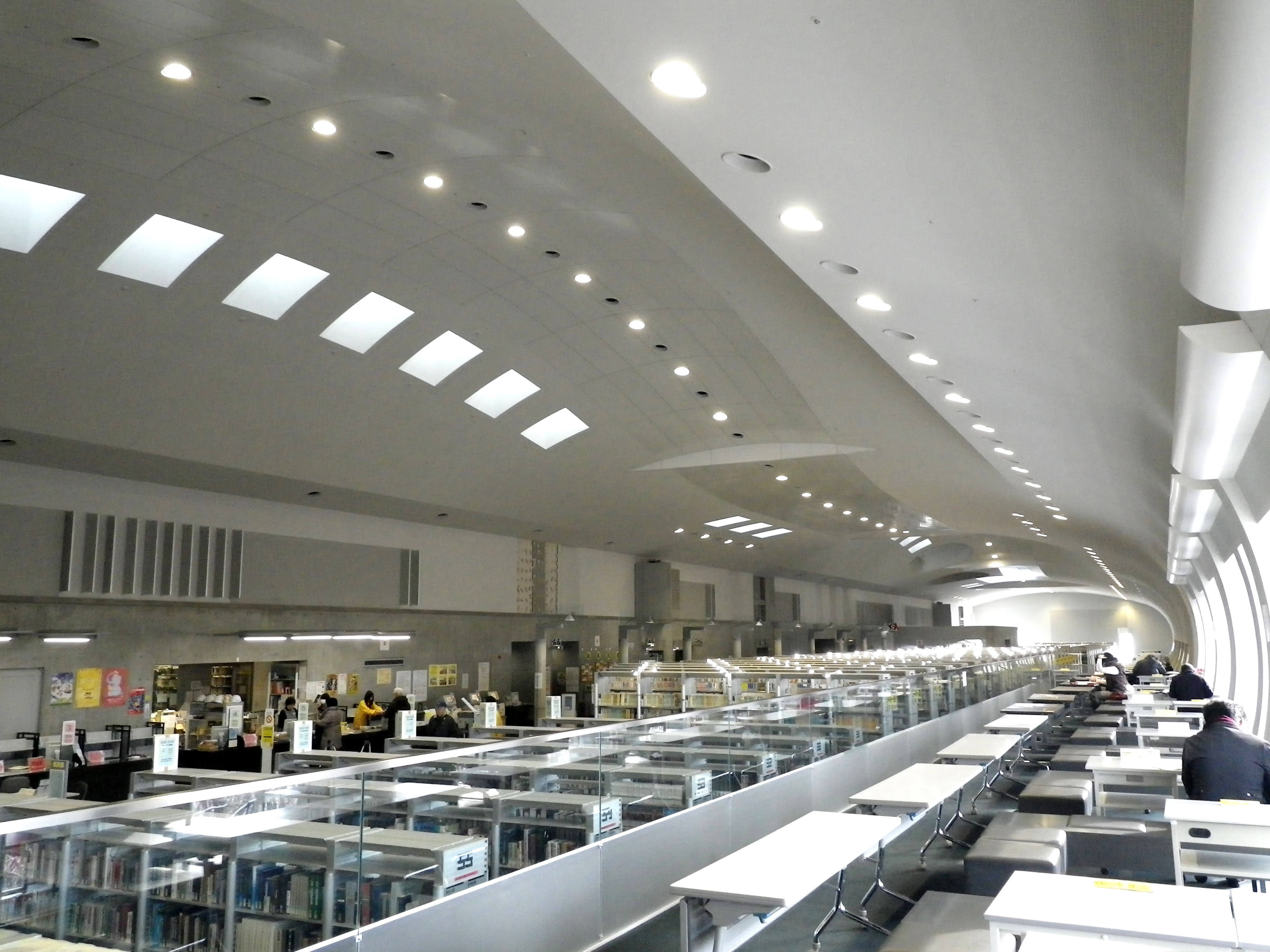 宮城県図書館の内部（3階）